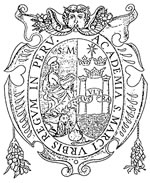 Segundo sello, escudo y logo que usó la Universidad Nacional Mayor de San Marcos.